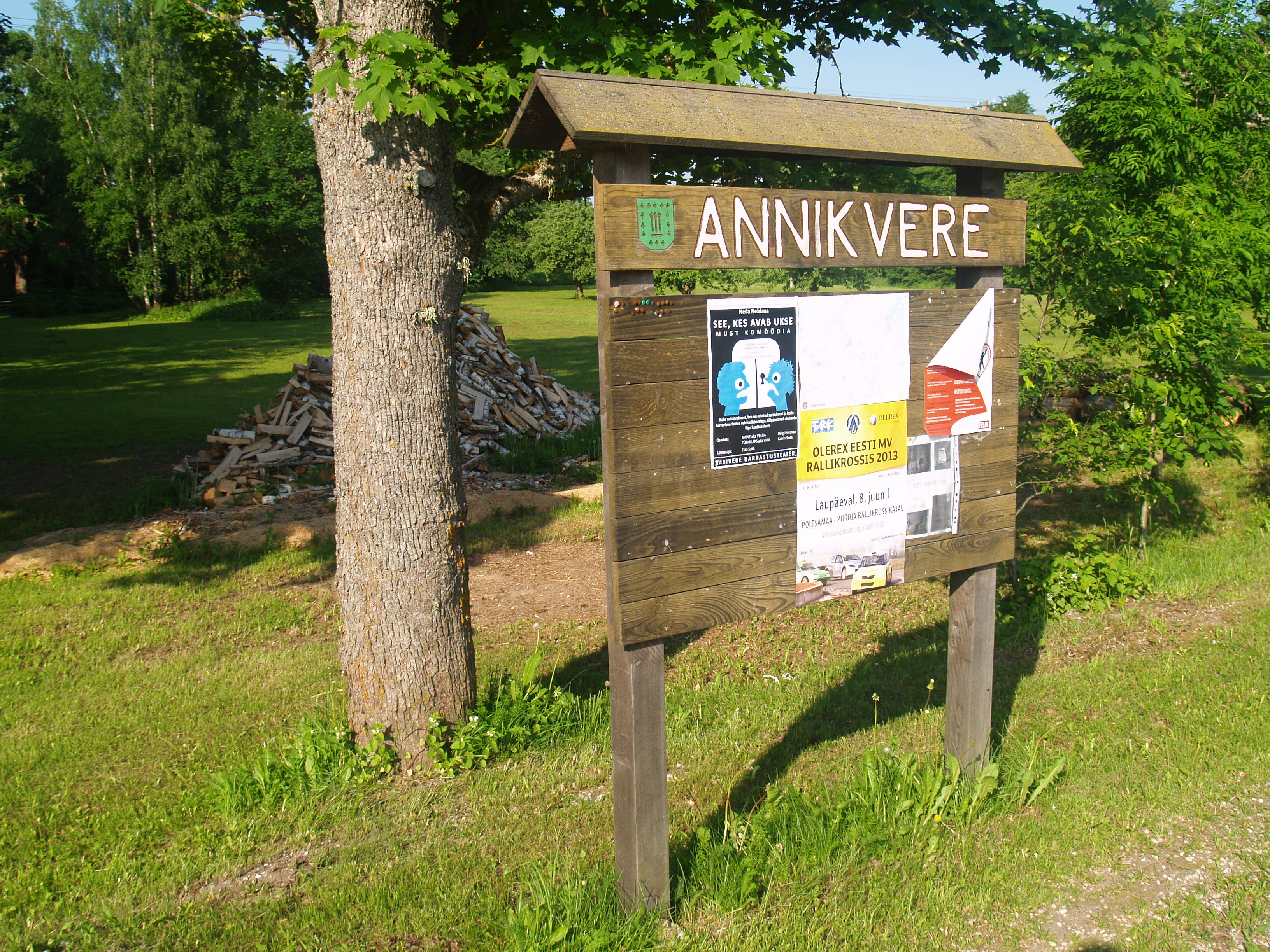 Jõgevamaa fotod